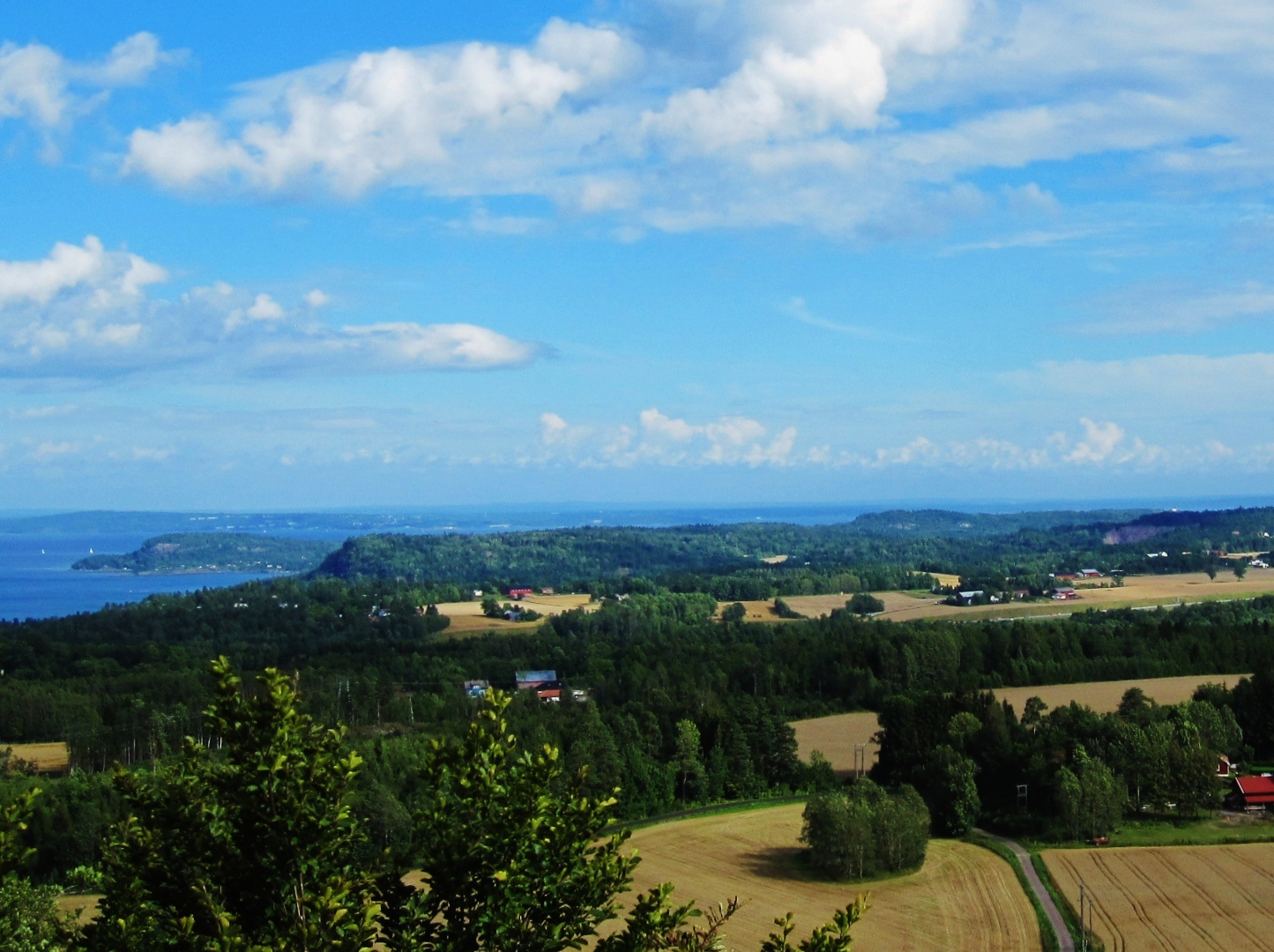 Re kommune, mot Mulvika